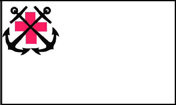 Meripelastusseuran alkuperäisin lippu ajalta ennen sotia